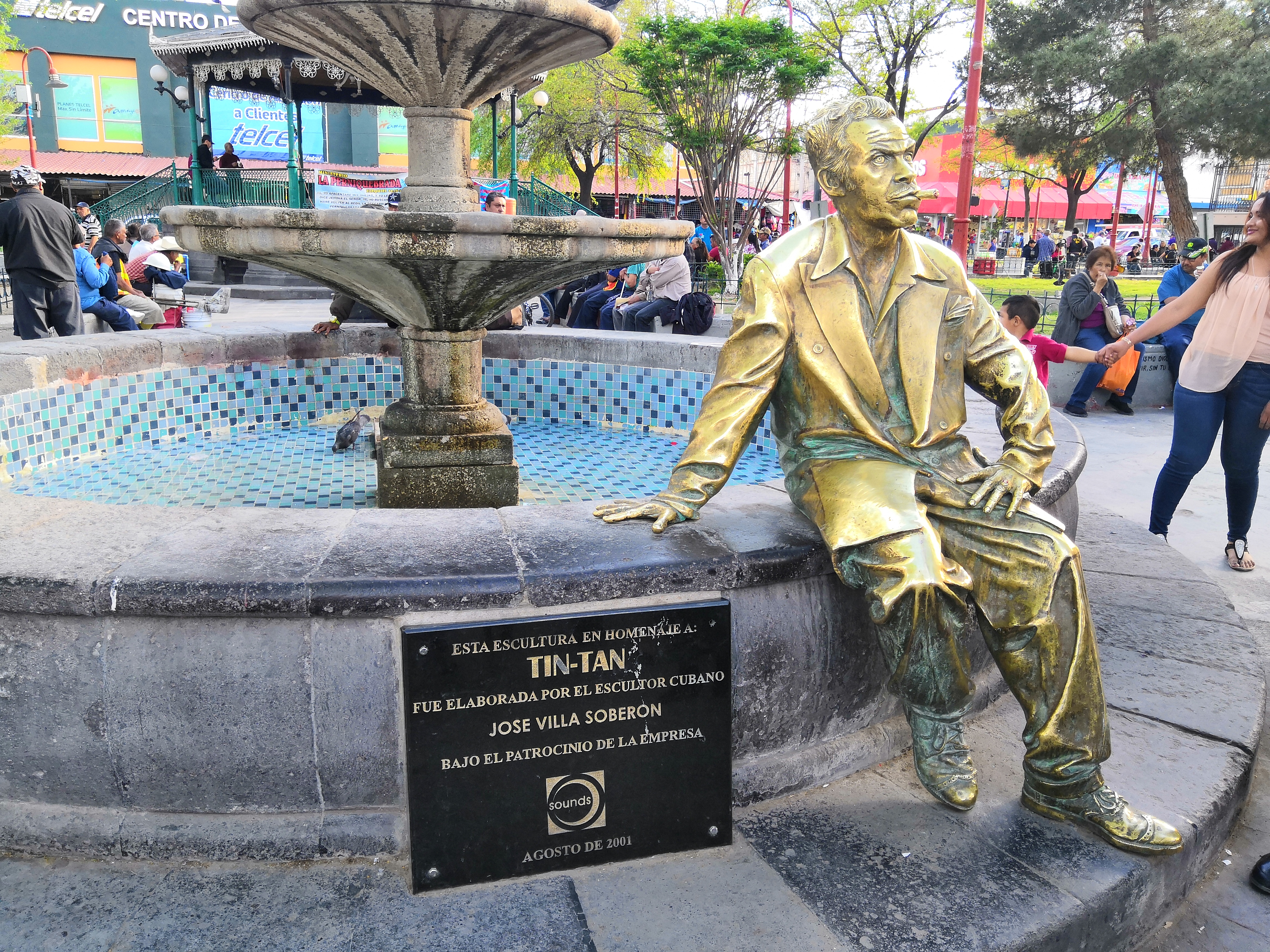 Estatua de Tin tan en Ciudad Juárez